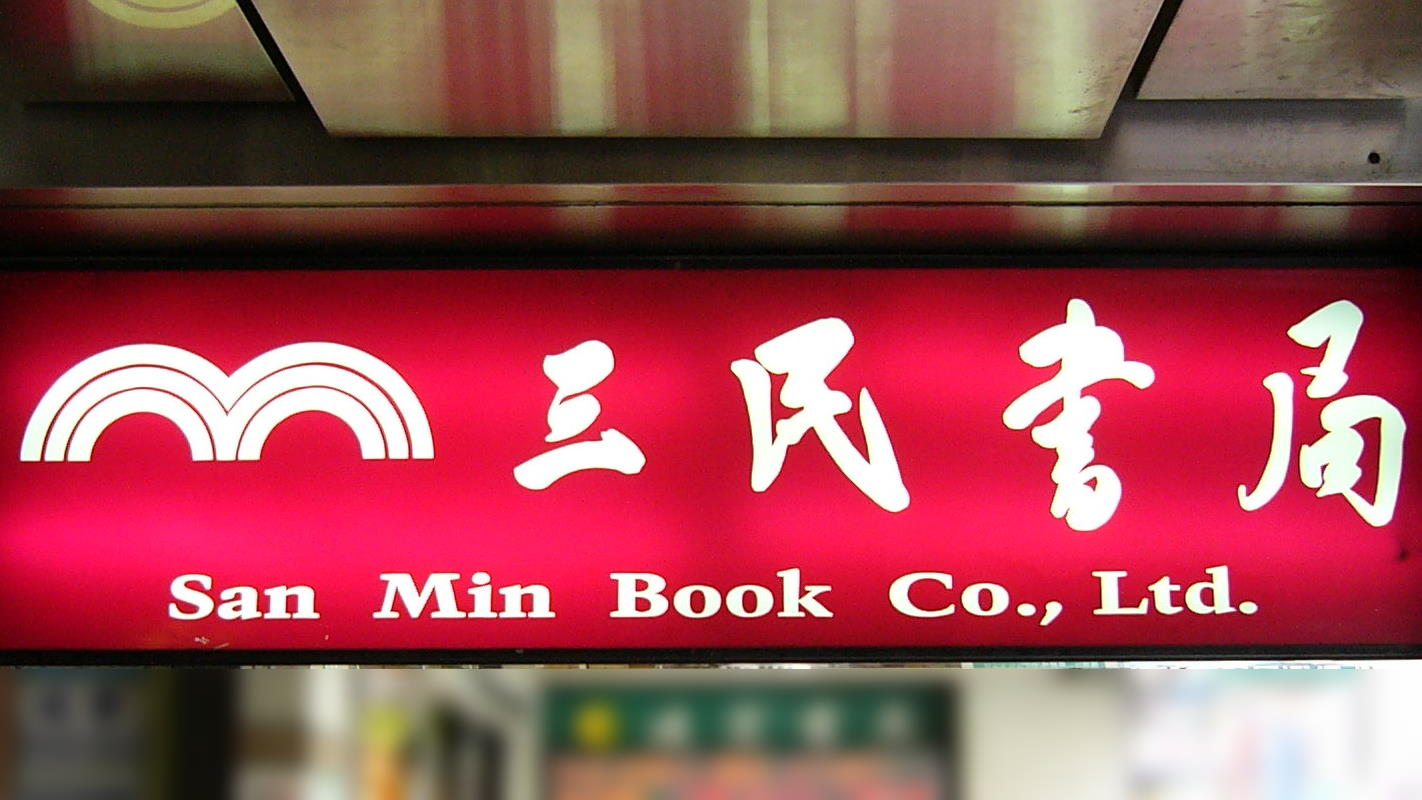 中文（台灣）: 臺北市中正區重慶南路一段，三民書局重南門市大門前騎樓，三民書局商標招牌。